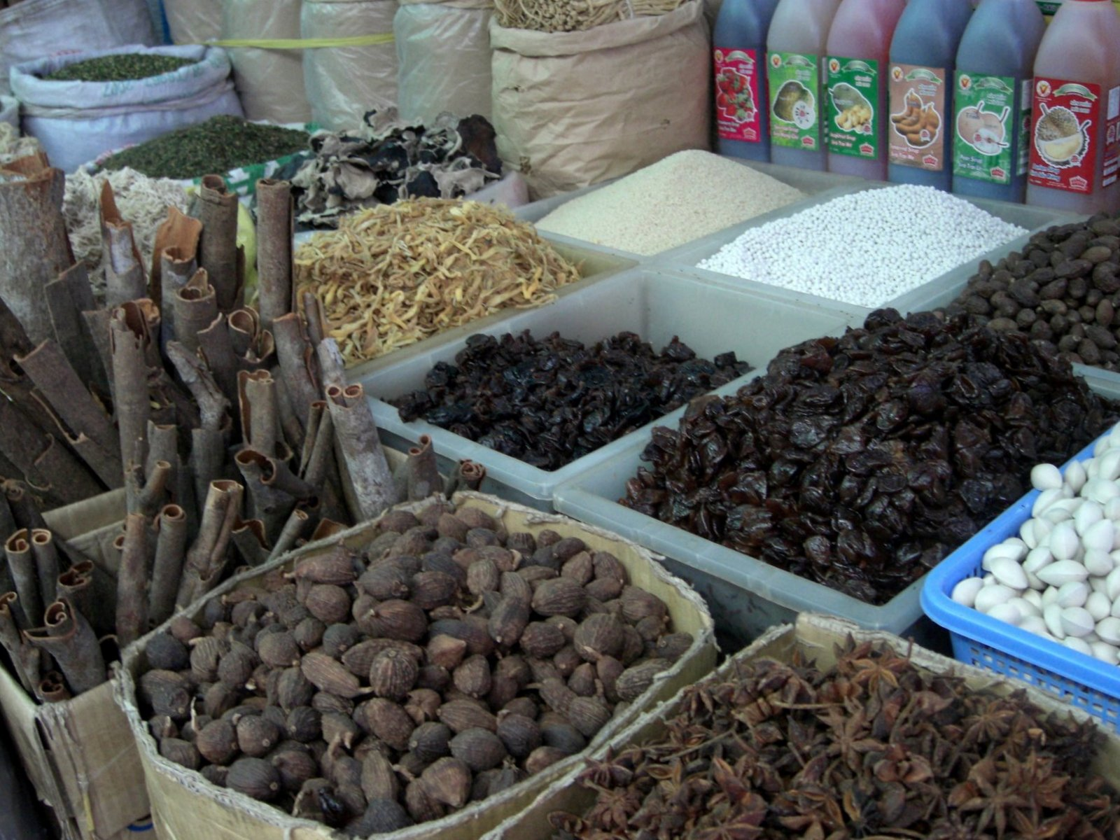 Cannelle, noix de muscade, anis au marché de Ho Chi Minh